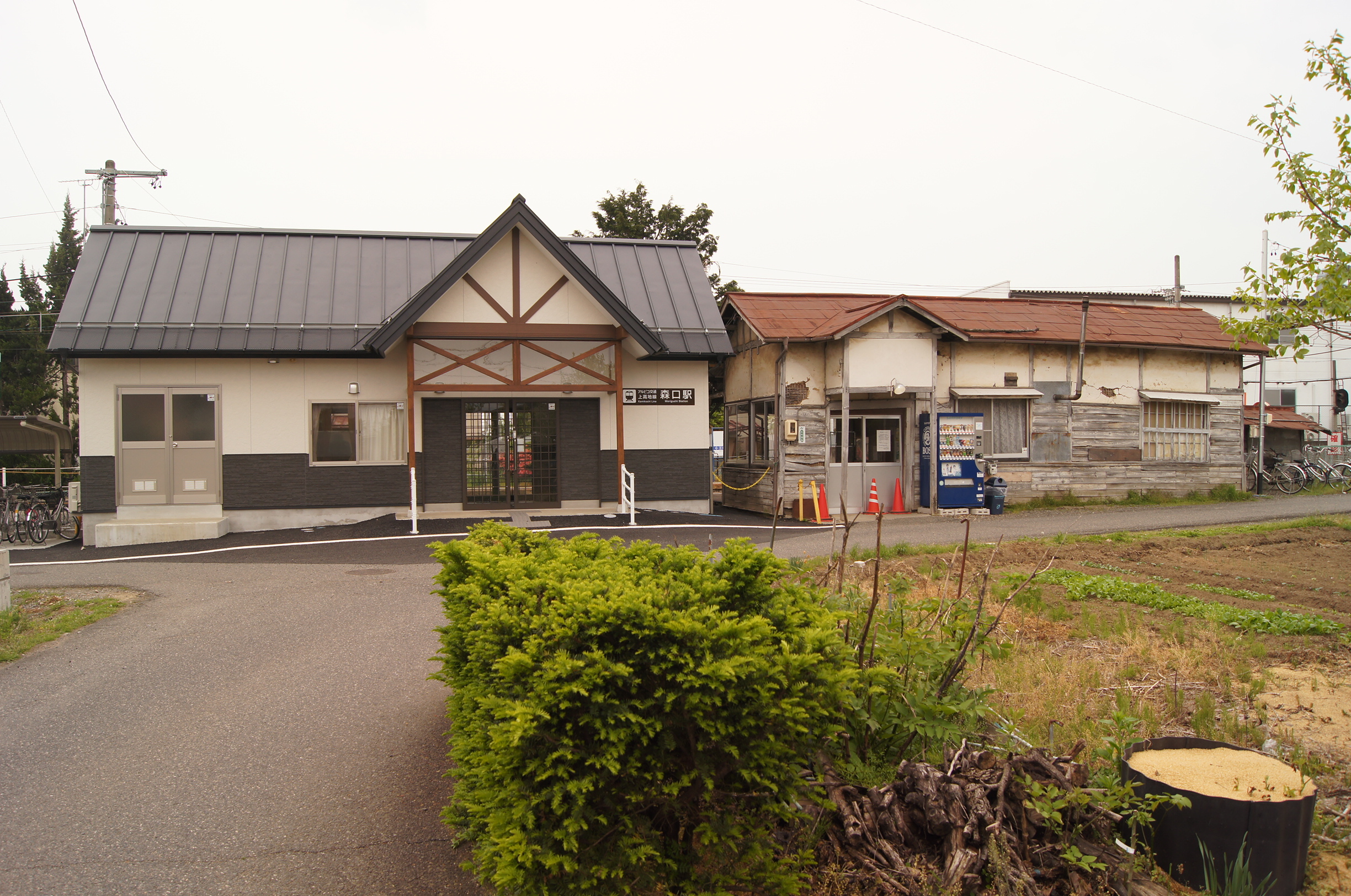 長野県松本市波田にあるアルピコ交通上高地線森口駅の駅舎を北側から撮影